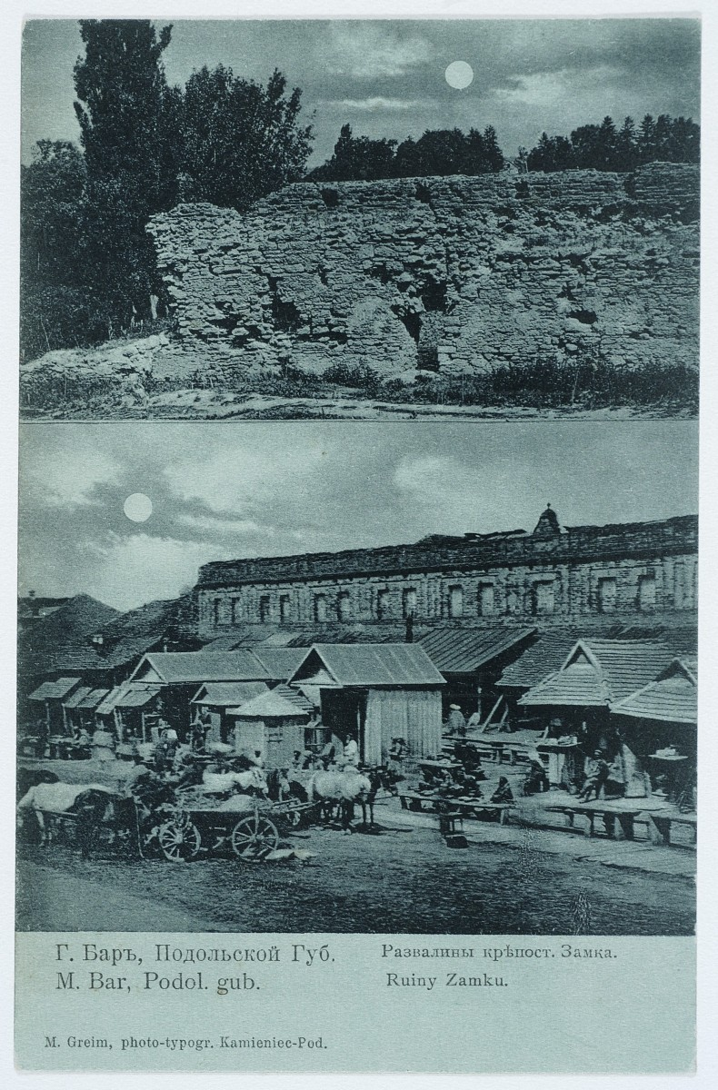 Місто Бар (Ров) на Поділлі. Руїни замку в Барі